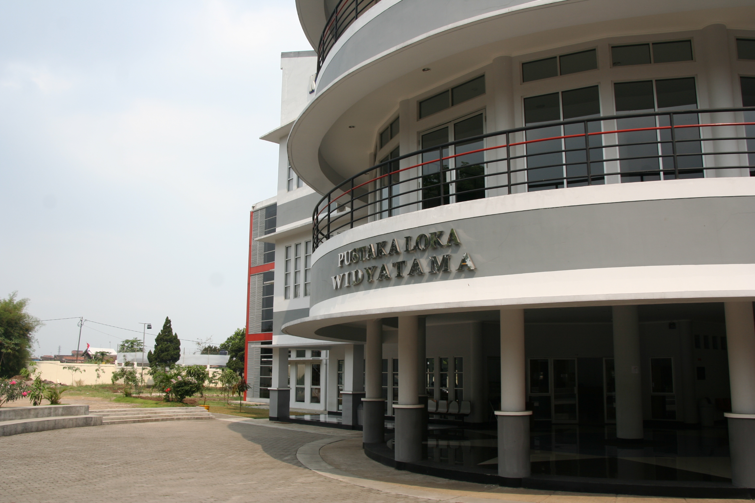 Sarana perpustakaan berada di gedung baru bernama Pustakaloka.